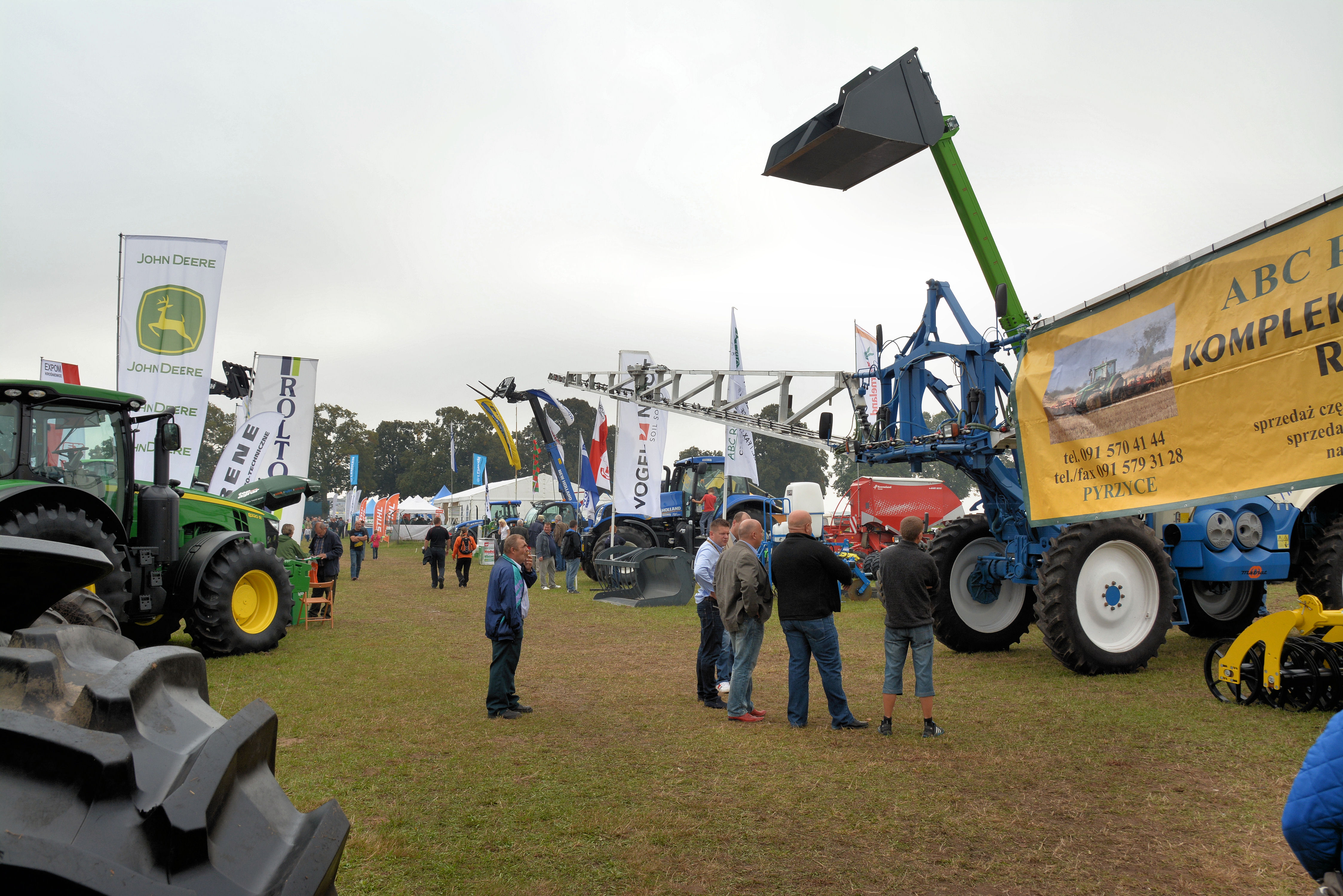 Barzkowice